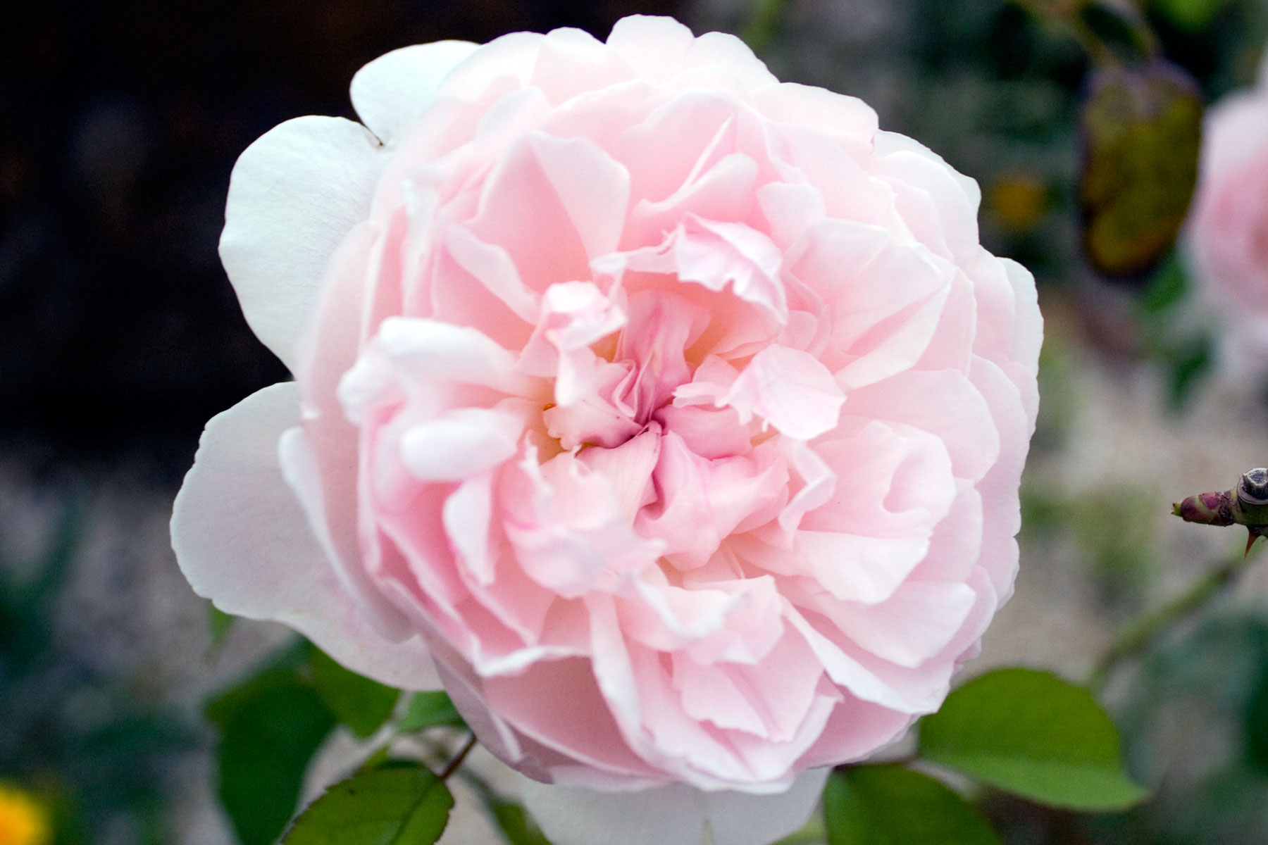 Redoute